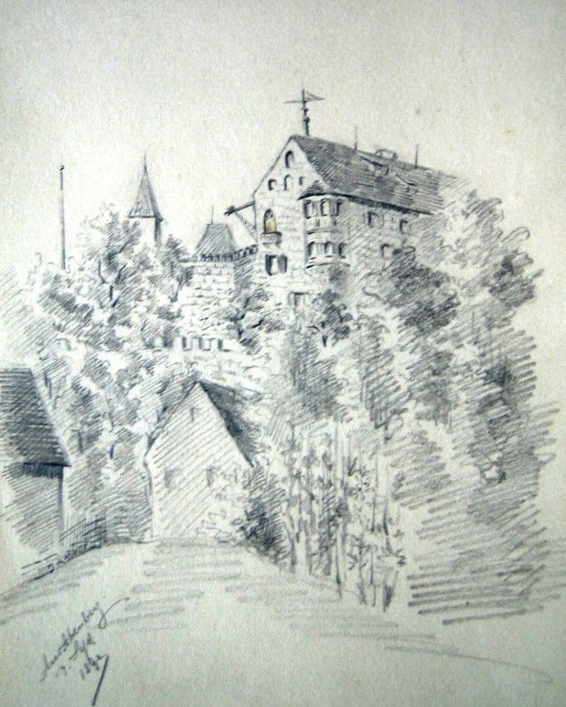 Burg Abenberg bei Roth, datiert 1890. Zeichnung, 24 x 16 cm